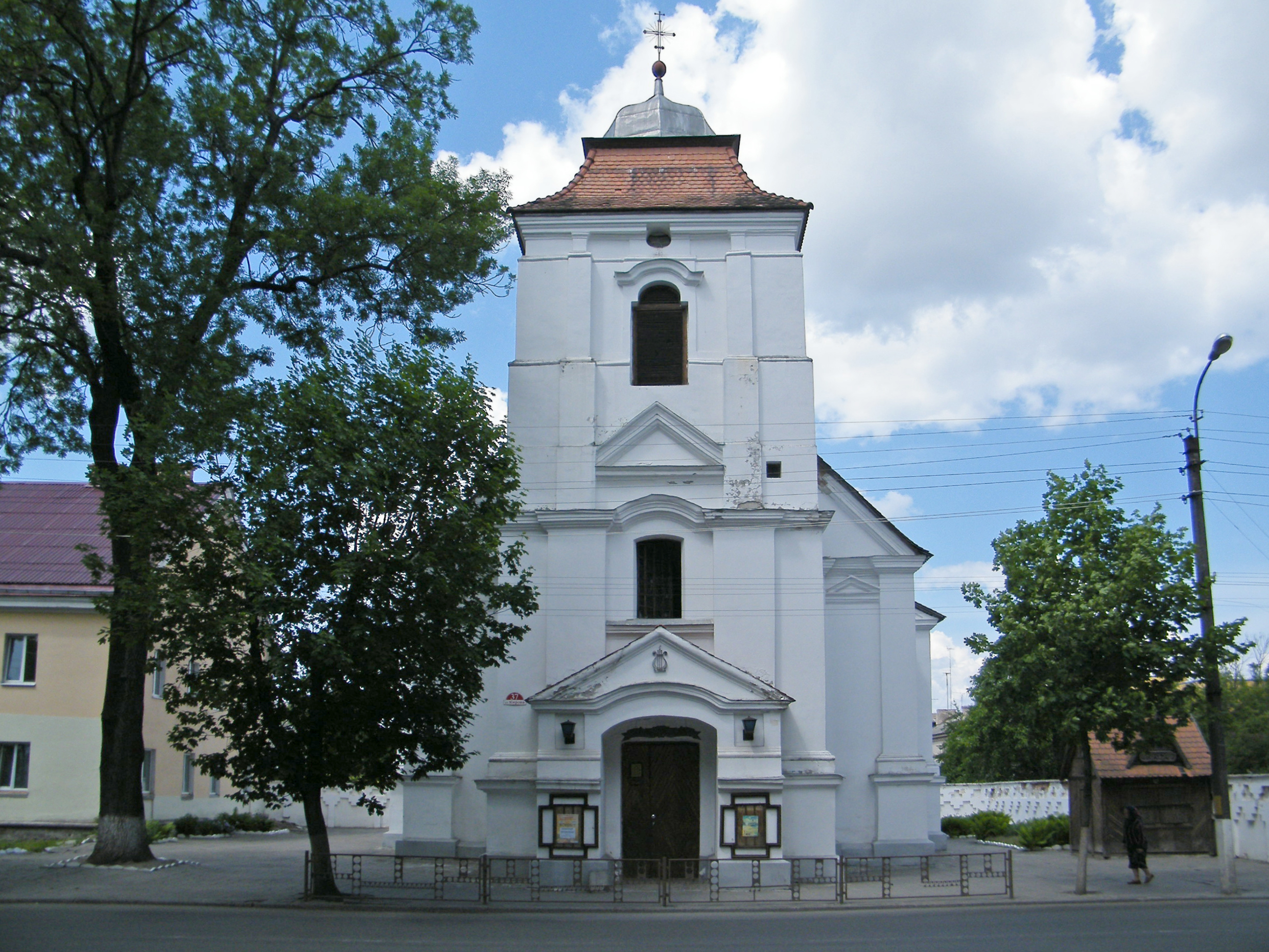 Костел Карла Баромея